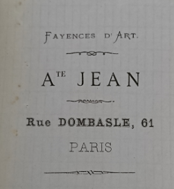 En-tête de lettre commerciale d'Auguste Jean du 61 rue Dombasle, Paris. Collection privée.